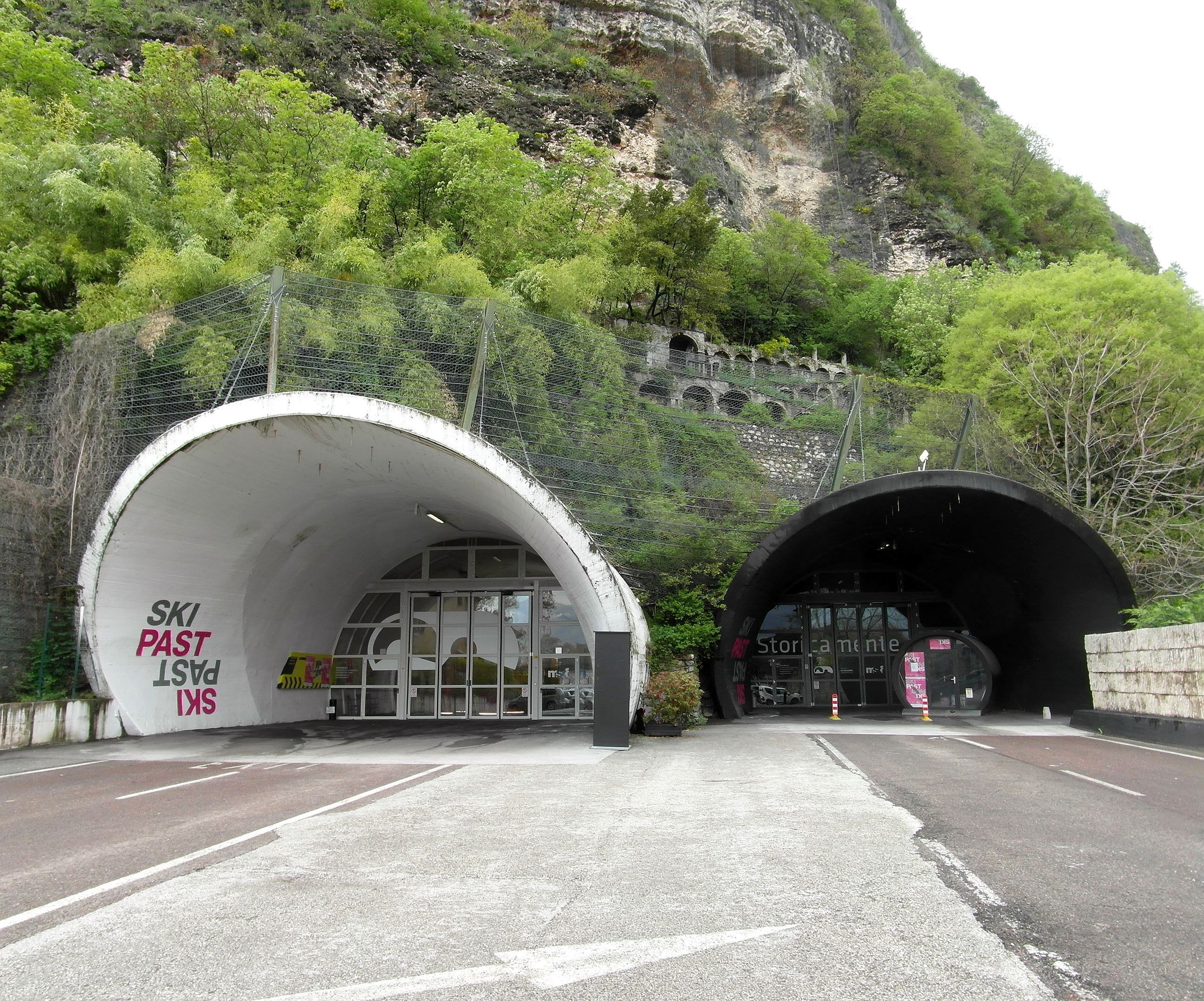 Gallerie Piedicastello